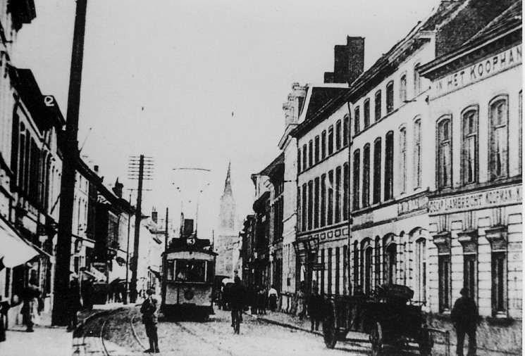 Foto van de bevrijdingslaan anno 1912